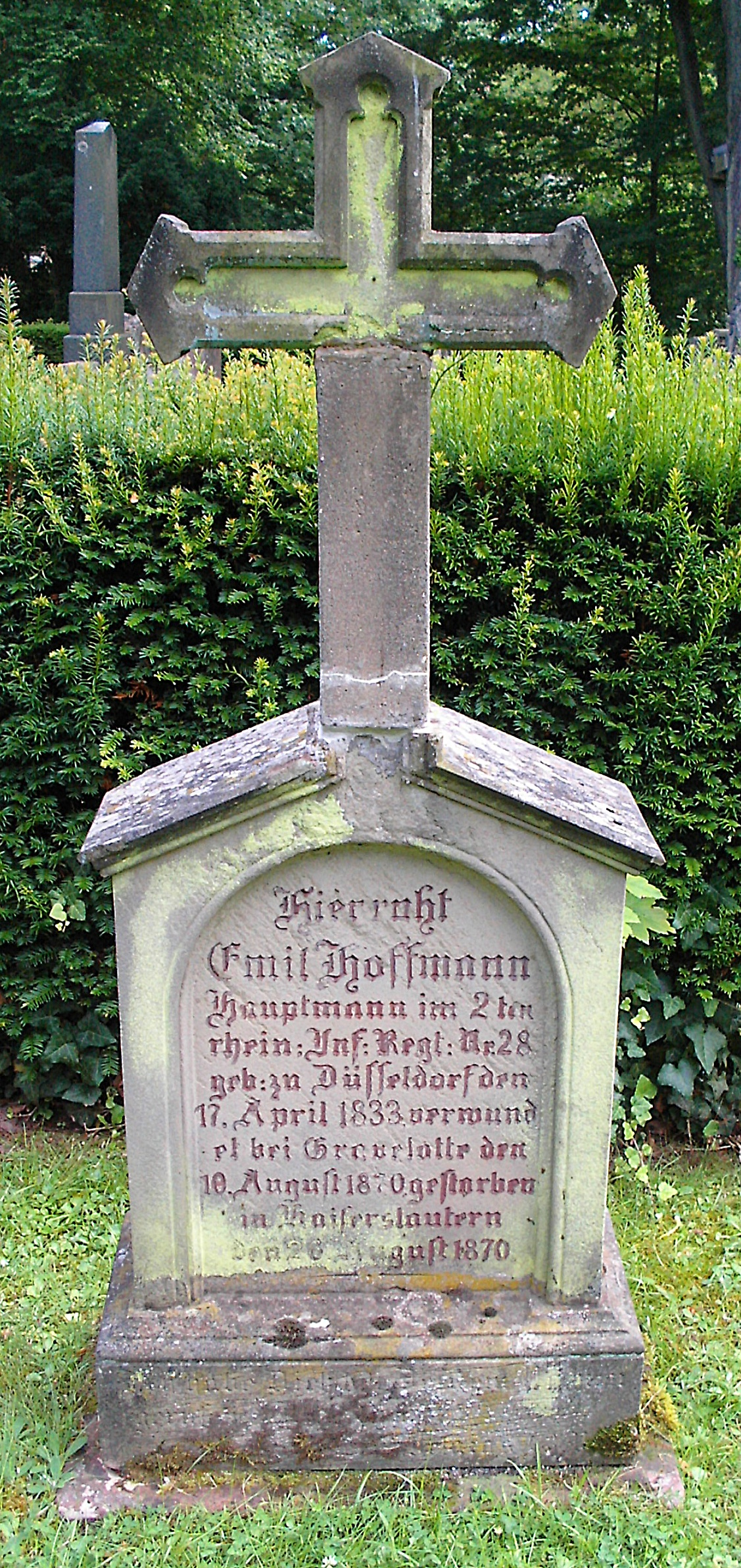 Hauptfriedhof Kaiserslautern, Grab eines Offiziers des 2. Rhein. Inf. Nr. 28, gestorben an seinen Verletzungen aus der Schlacht bei Gravelotte, 1870